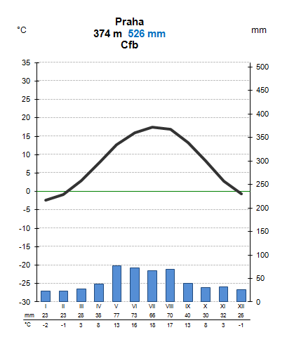 Praha klimadiagramm